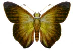 Hasora discolor mastusia